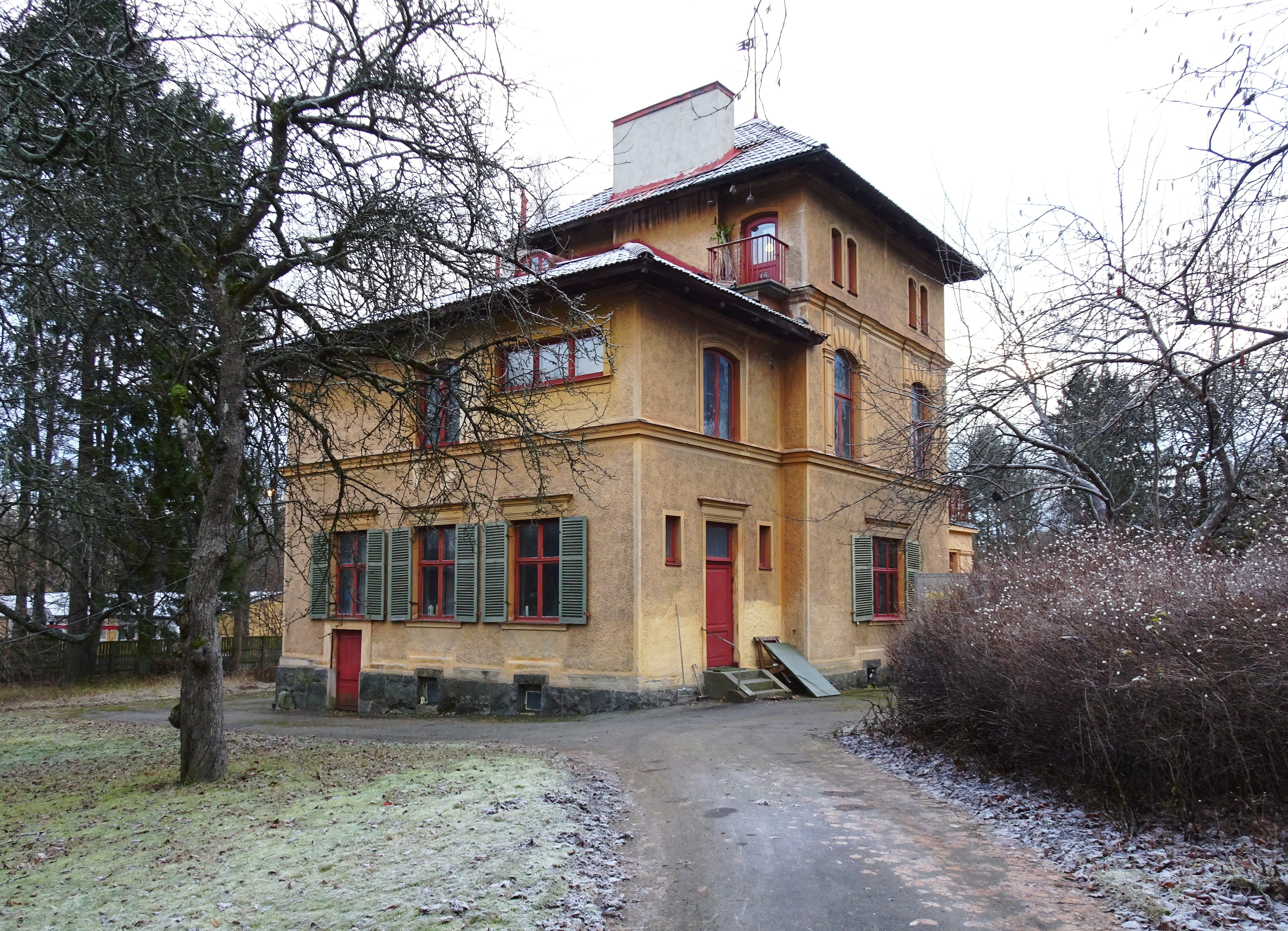 Villa Snäckan, Stockholmsvägen 46, Saltsjöbaden, arkitekt Gustaf Lindgren